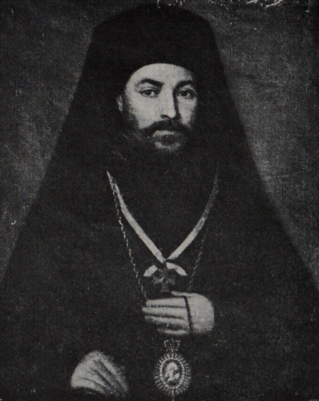 Episcopul Filoftei al Buzăului